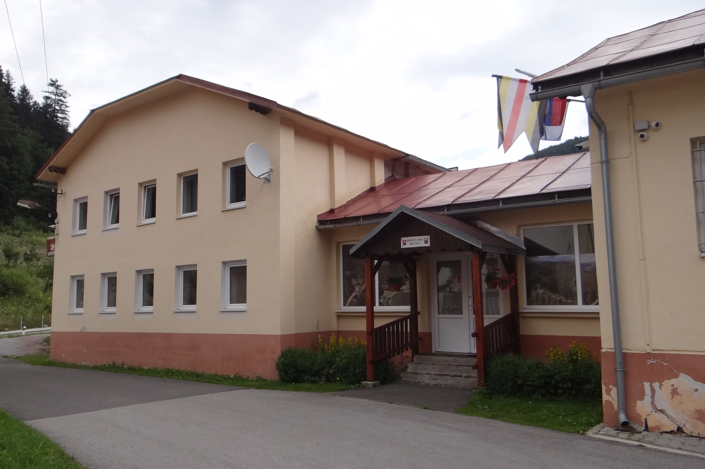 Motyčky. Urząd gminy